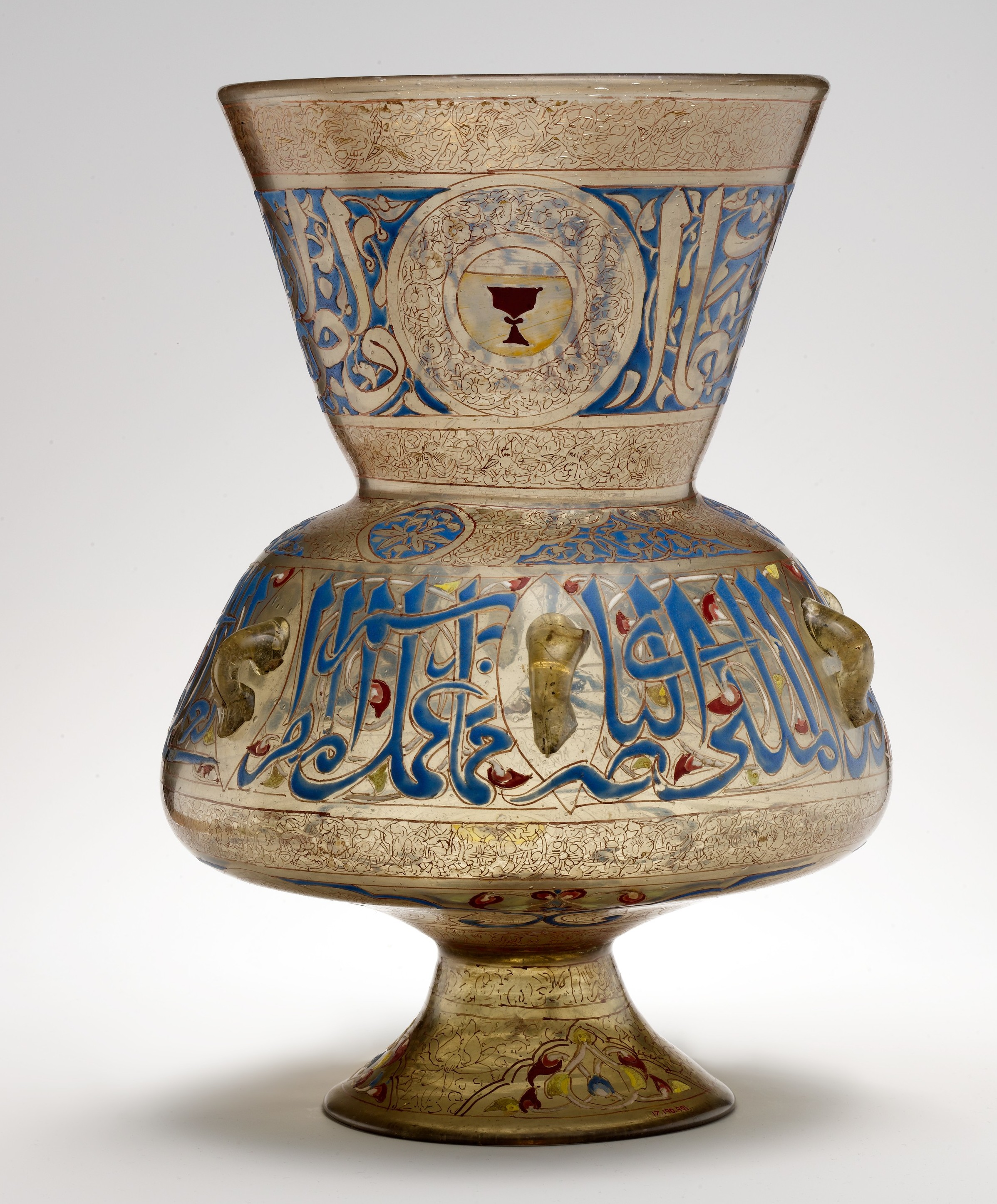 Mosque lamp; Glass